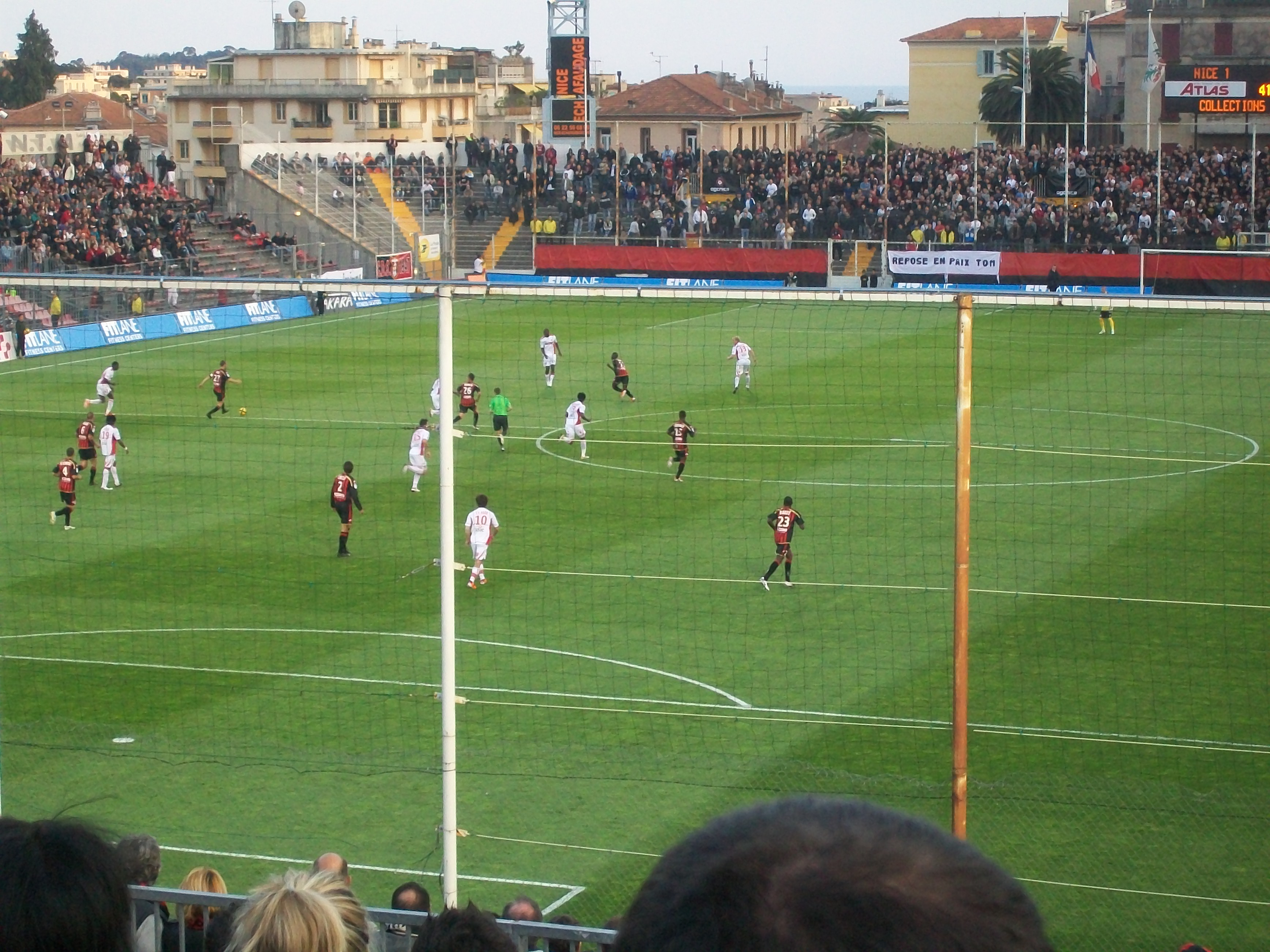 Vue générale du stade du Ray lors du match Nice-Monaco (3-2) le 16 avril 2011.